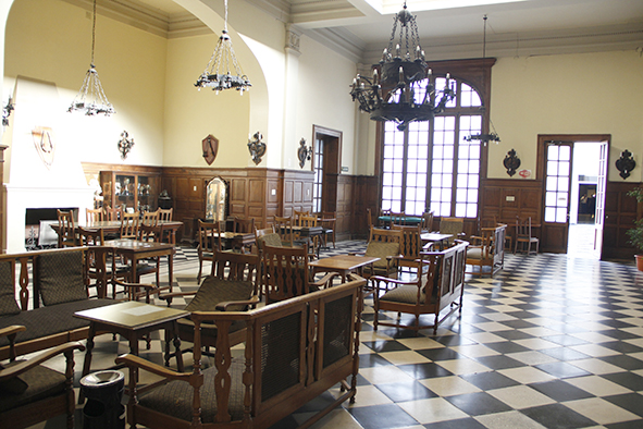 Recepción del club Gimnasia y Esgrima Mendoza